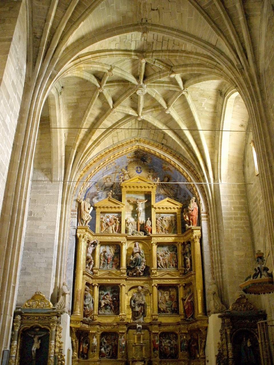 Church of San Martín, Estavillo